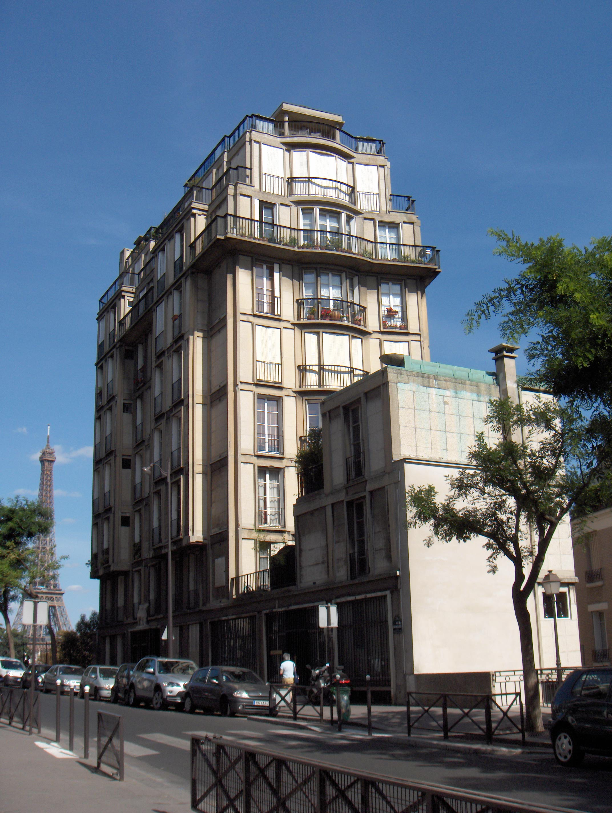 Auguste Perret (français, 1874-1954): Immeuble rue Raynouard (1930-1932), 55 rue Raynouard, XVIe arrondissement, Paris, France. Immeuble habité par l'architecte jusqu'à sa mort en 1954.